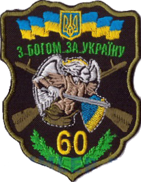 Нарукавний знак, 60 окрема механізована бригада